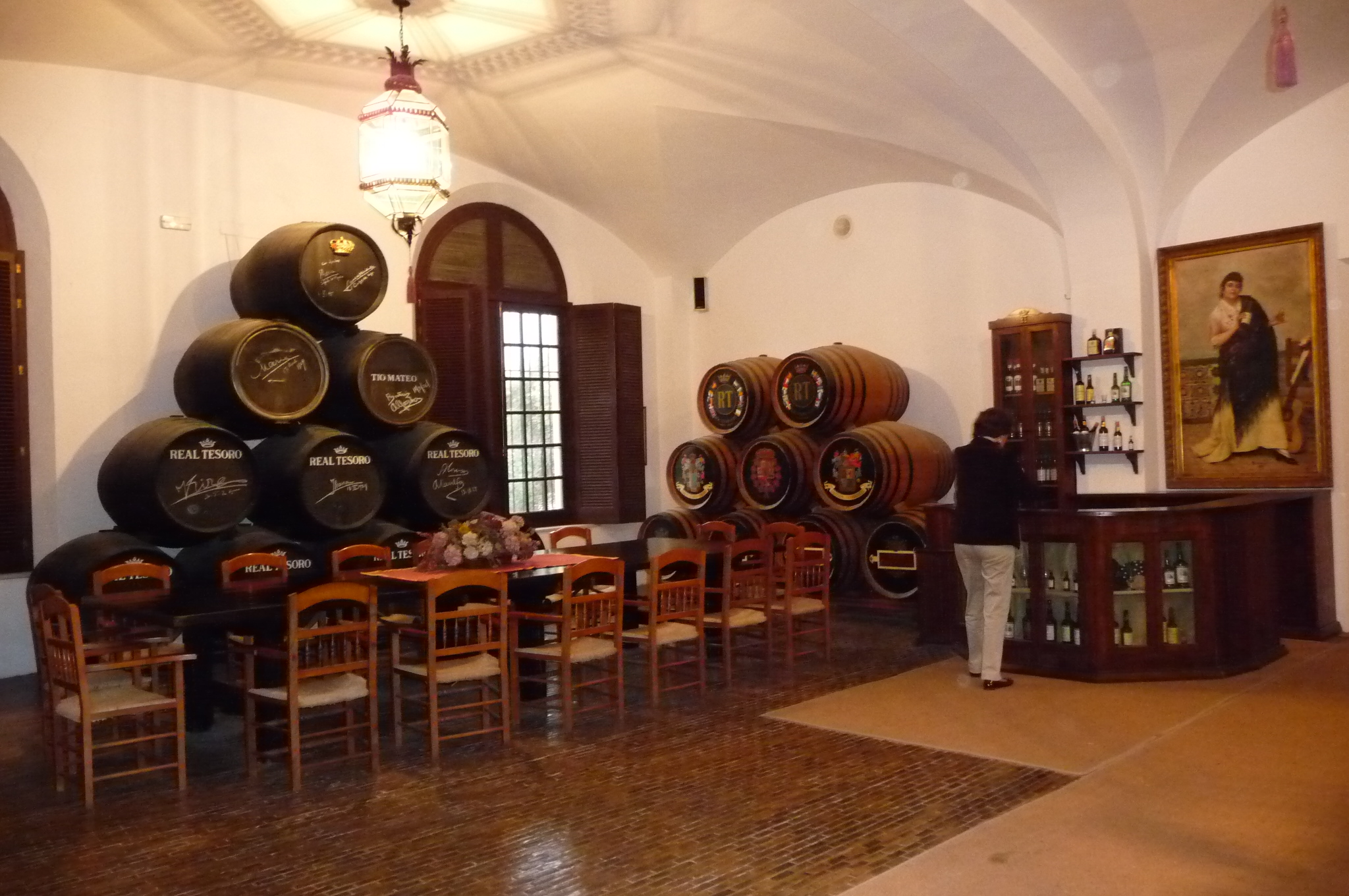 BodegaRealTesoro-JerezDeLaFrontera-p1000021.jpg